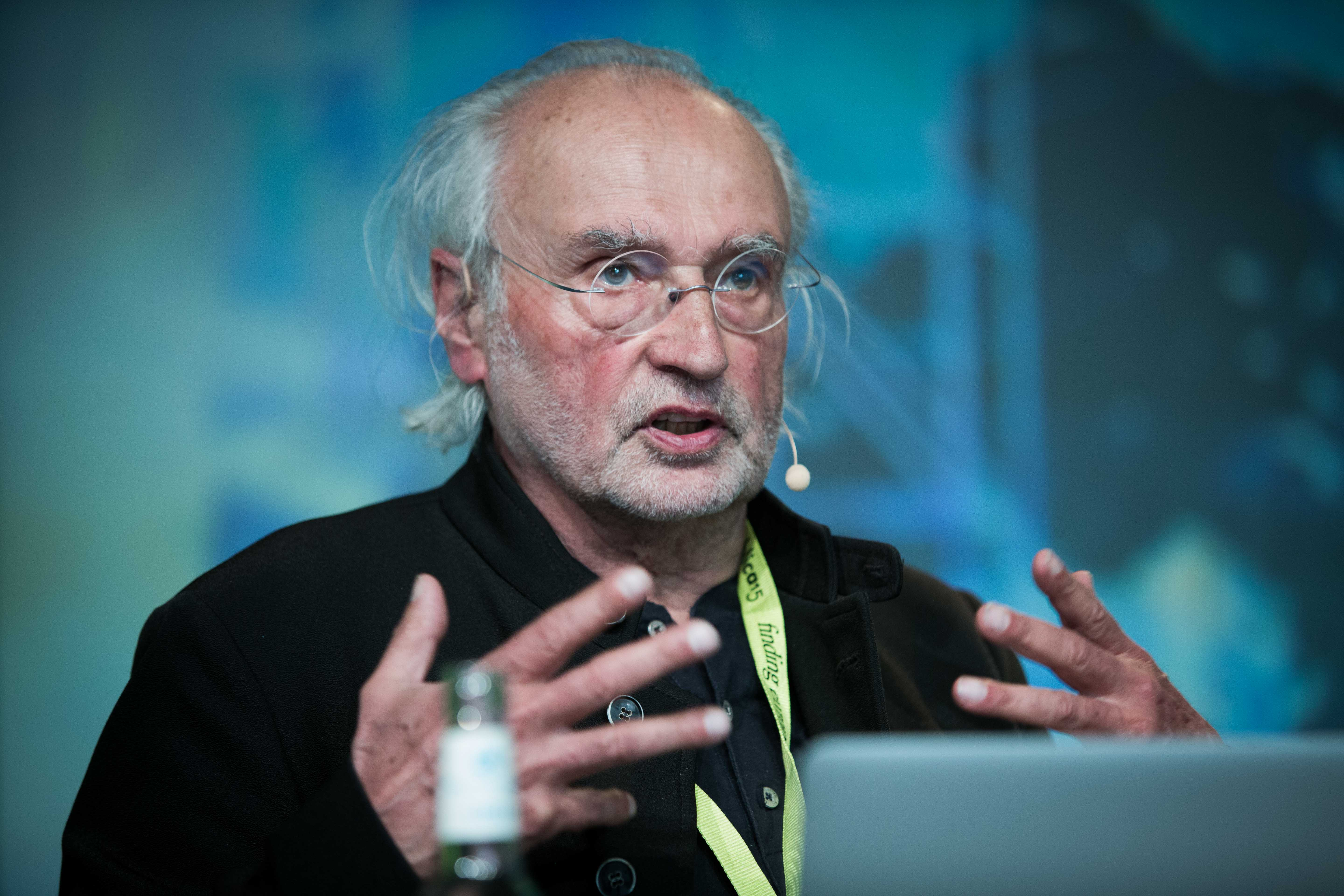 Günter Zamp Kelp spricht auf der re:publica 2015 am 06.05.2015 in Berlin. Copyright: re:publica/Jan Zappner